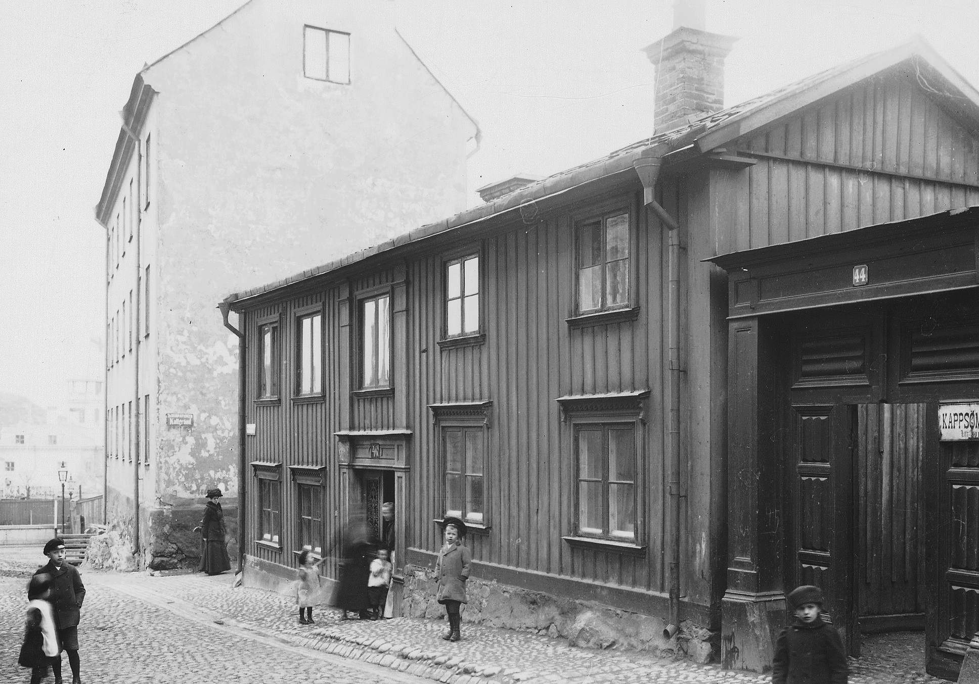 Bastugatan 44-46, Kvarteret Kattfoten mindre, i bakgrunden syns hyreshuset i fastigheten Skinnarviken 1